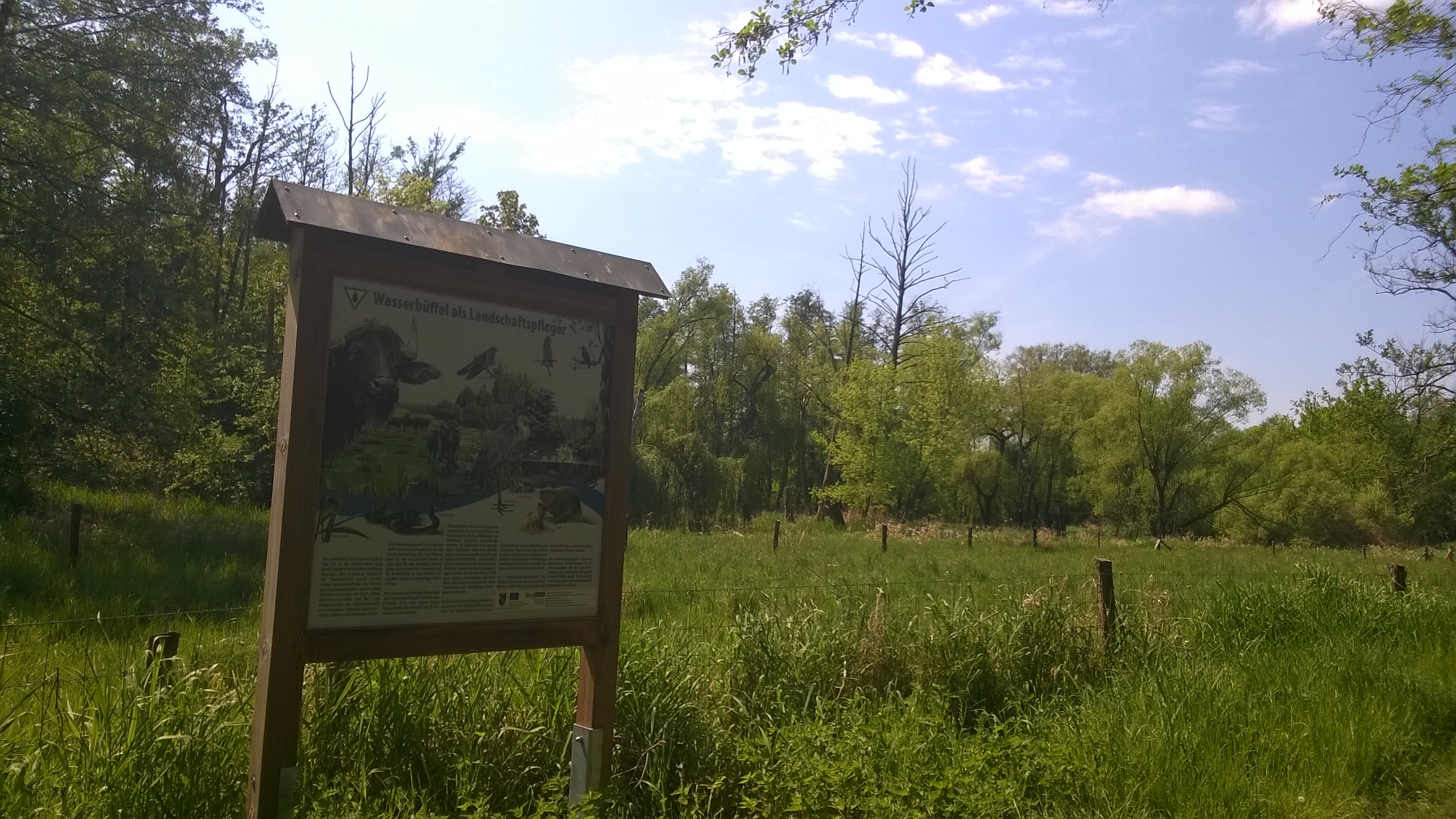 Informationstafel zu Wasserbüffeln im Tegeler Fließ in Waidmannslust, aufgenommen beim Naturtag der Freien Alternativschule Berlin